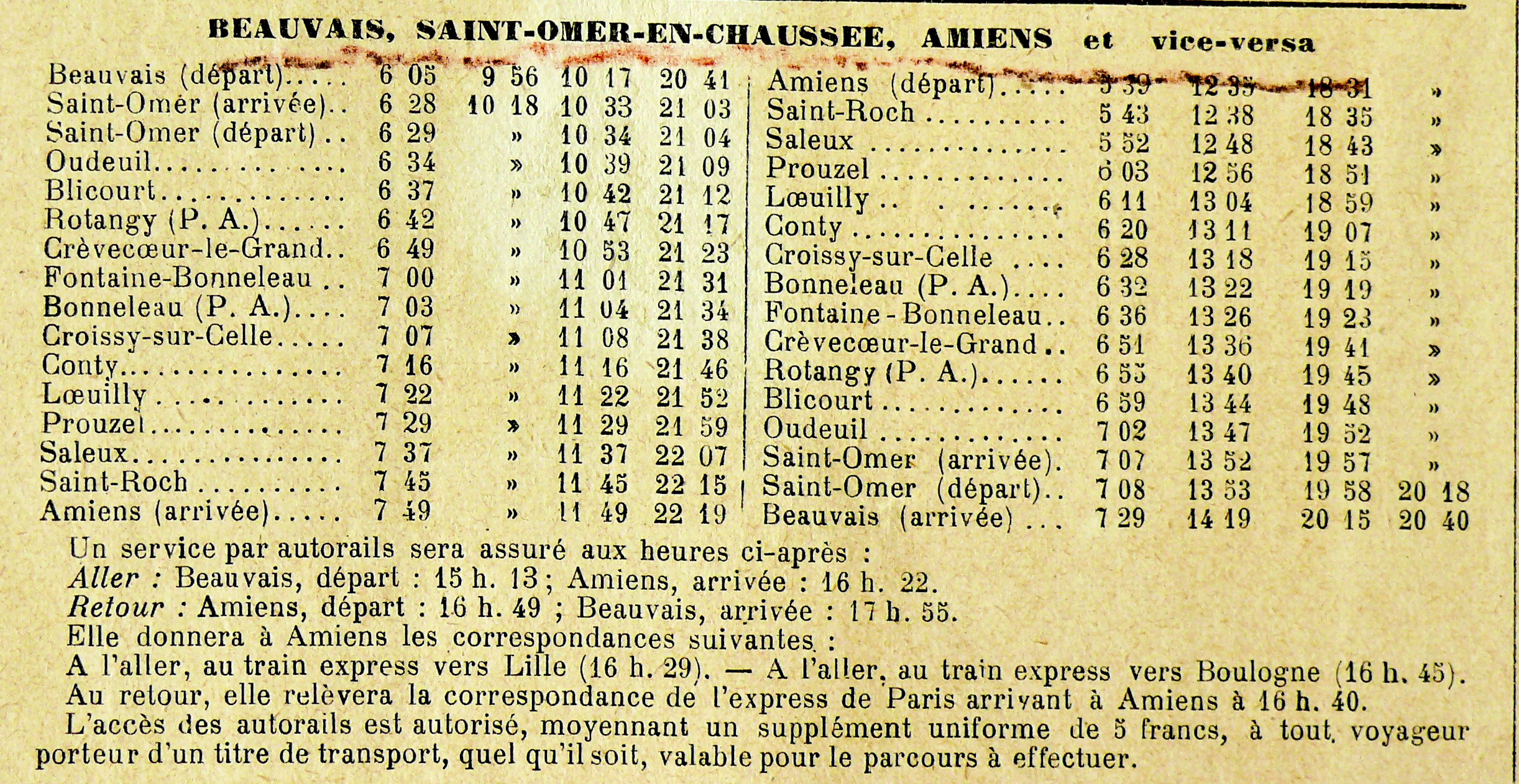 Horaires du 15 mai 1938 de la ligne de chemins de fer Beauvais - Amienspubliés dans la Tribune de l'Oise des 5/6 juin 1938, conservée aux archives départementales de l'Oise